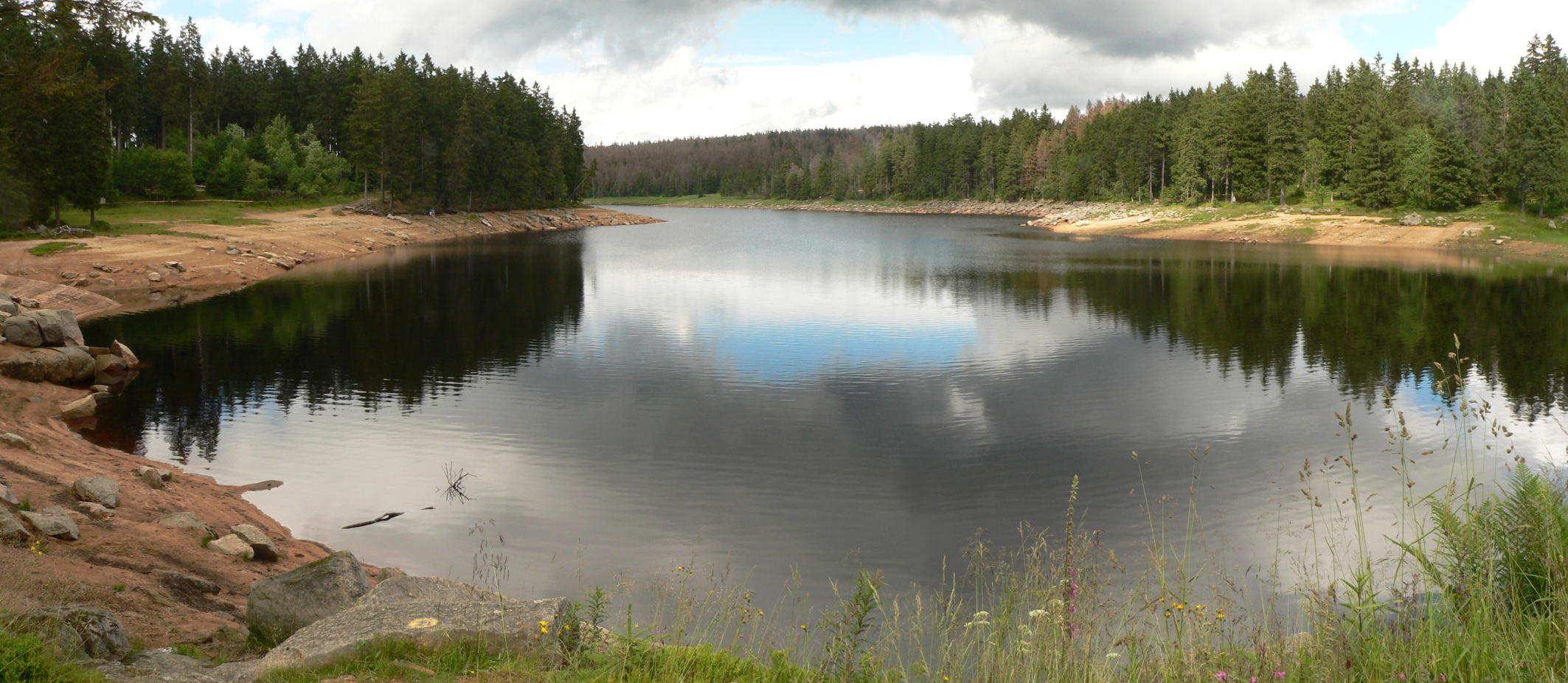 Oderteich